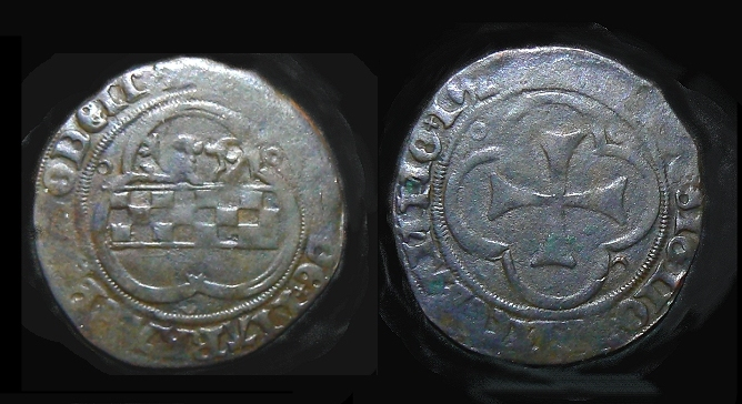 Monnaie liégeoise d'Erard de la Marck.